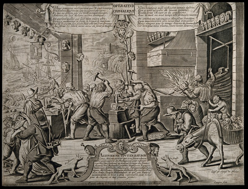 Gravure représentant des têtes de femmes reforgées dans l'atelier de Lustucru au bord de la mer, représentant un remède brutal à la " folie " des femmes.